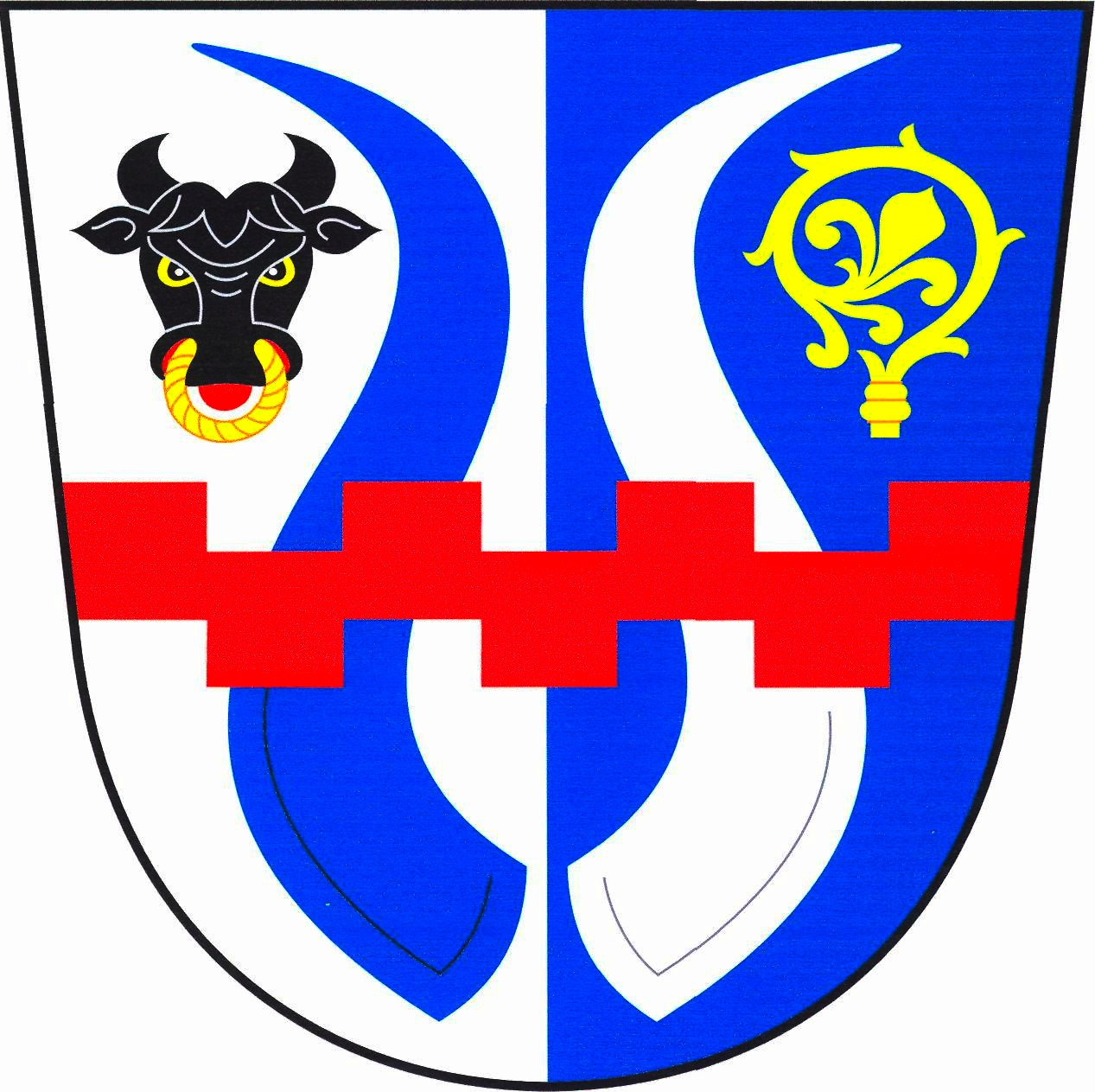 Znak obce Drahonín